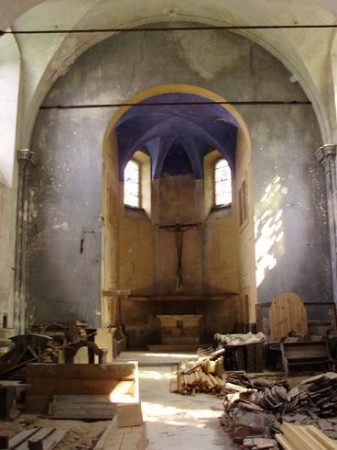 Interiér pavlovického kostela v létě r. 2008.